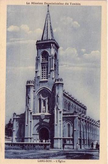 Nhà thờ chính tòa Lạng Sơn khi chưa bị phá hủy